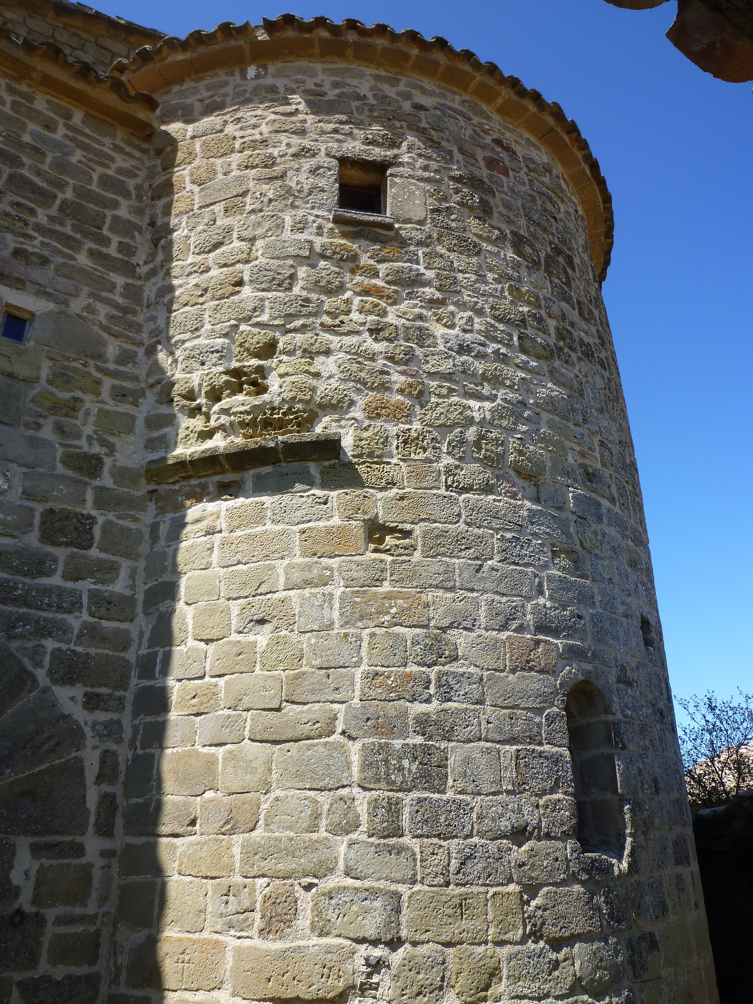 Absis de la capella de la masia de Santdiumenge, a nord de Su, municipi de Riner